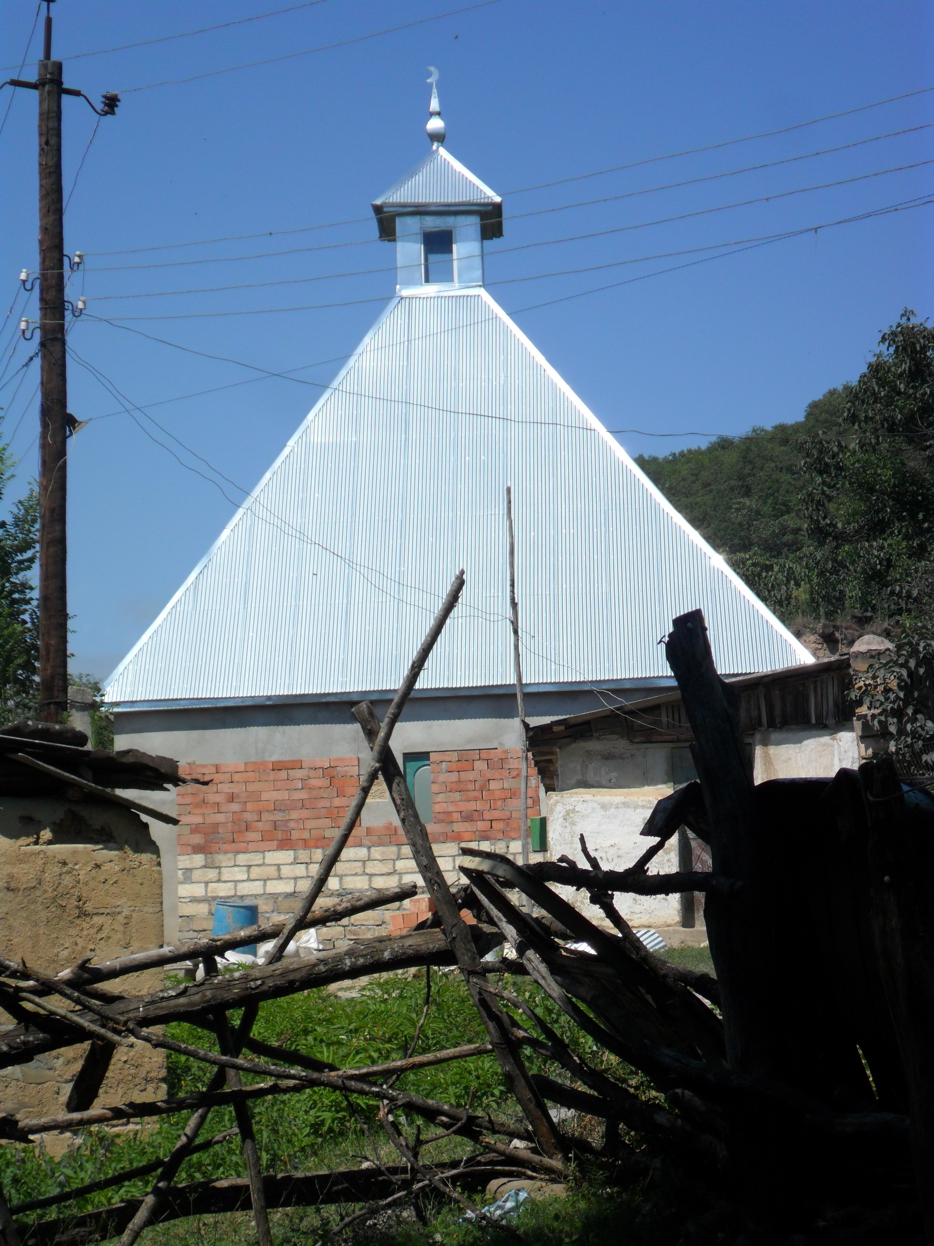 Gültəpə kəndində məscid